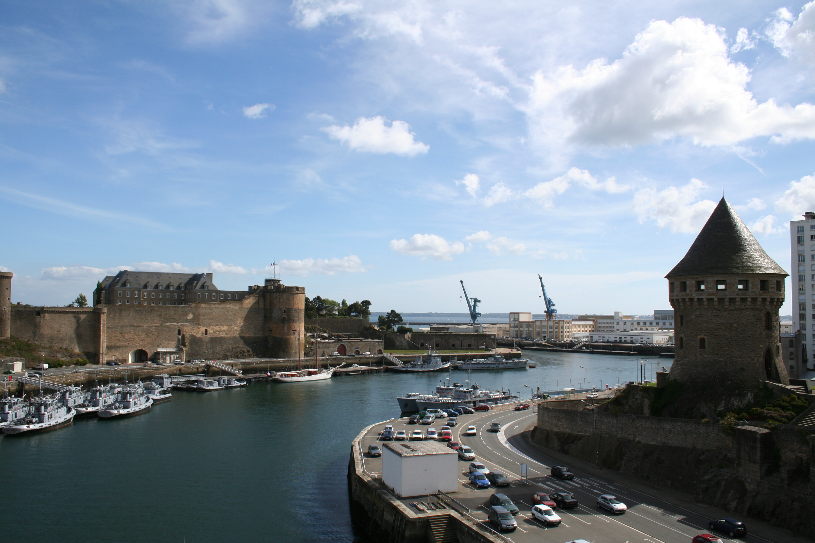 Au premier plan, la Tour Tanguy; sur l'autre rive de la Penfeld, le Château de Brest.